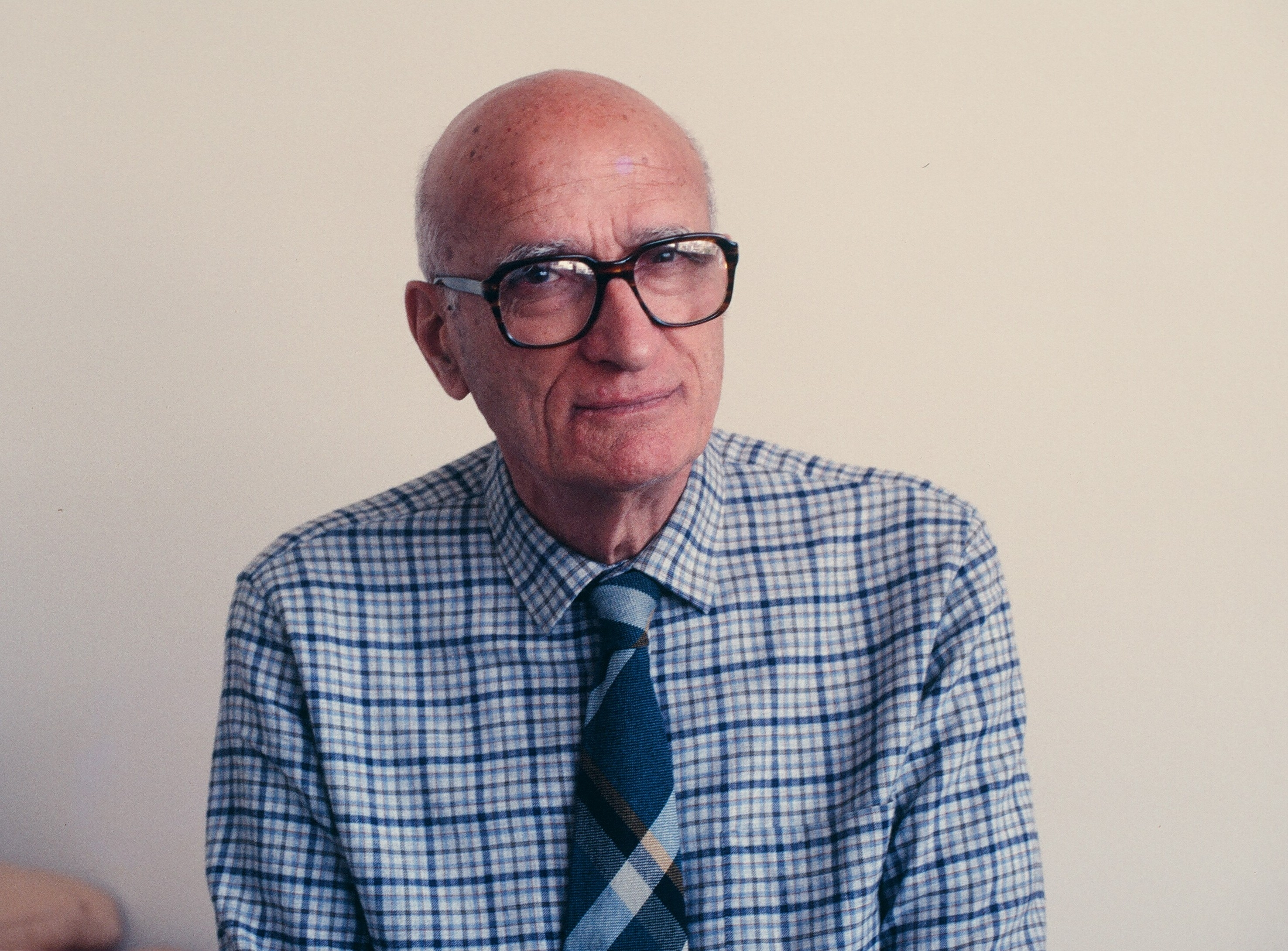 Ramón Carnicer fotografiat per Alonso Carnicer